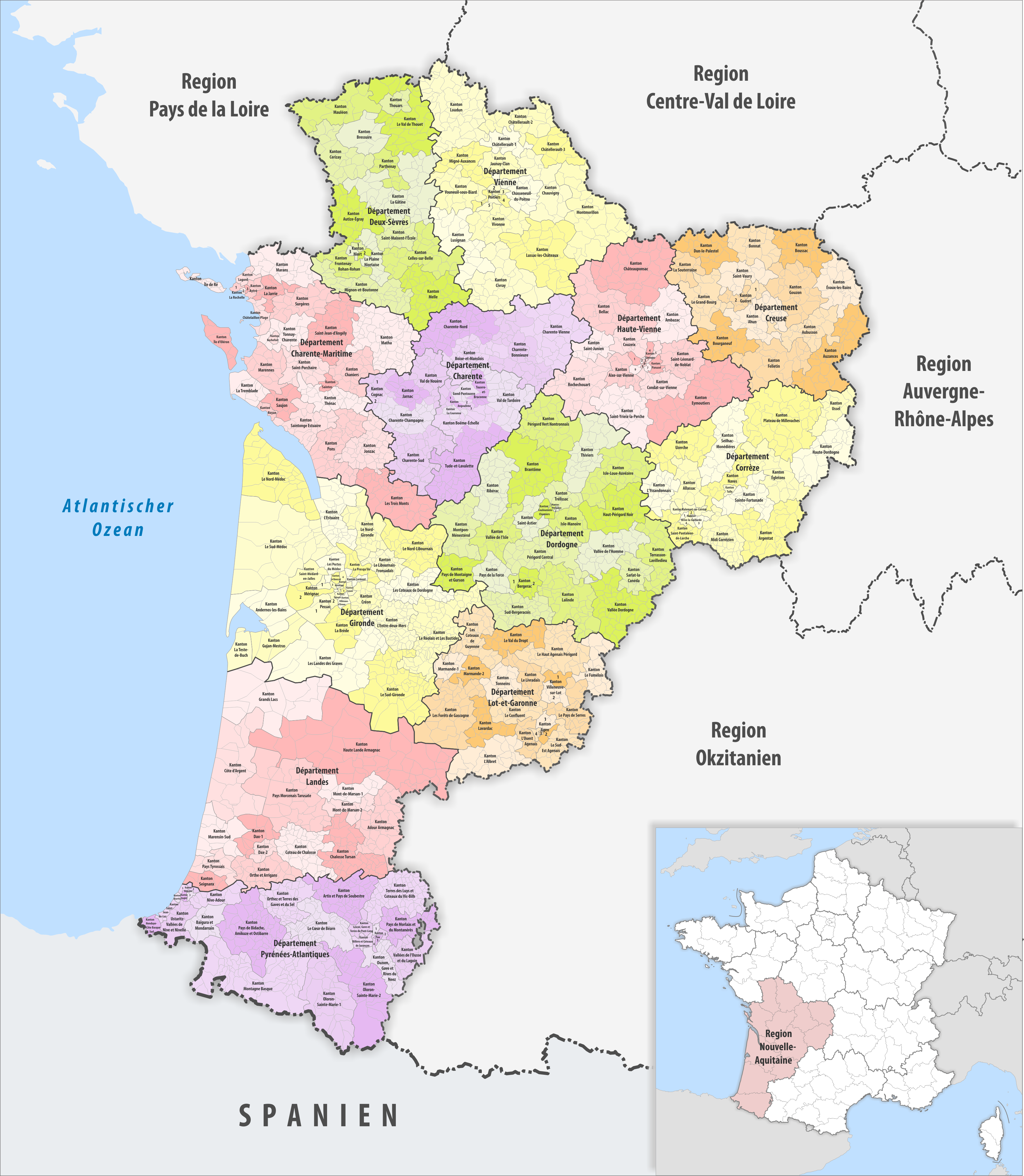 Gemeinden, Kantone und Departemente in der Region Nouvelle-Aquitaine